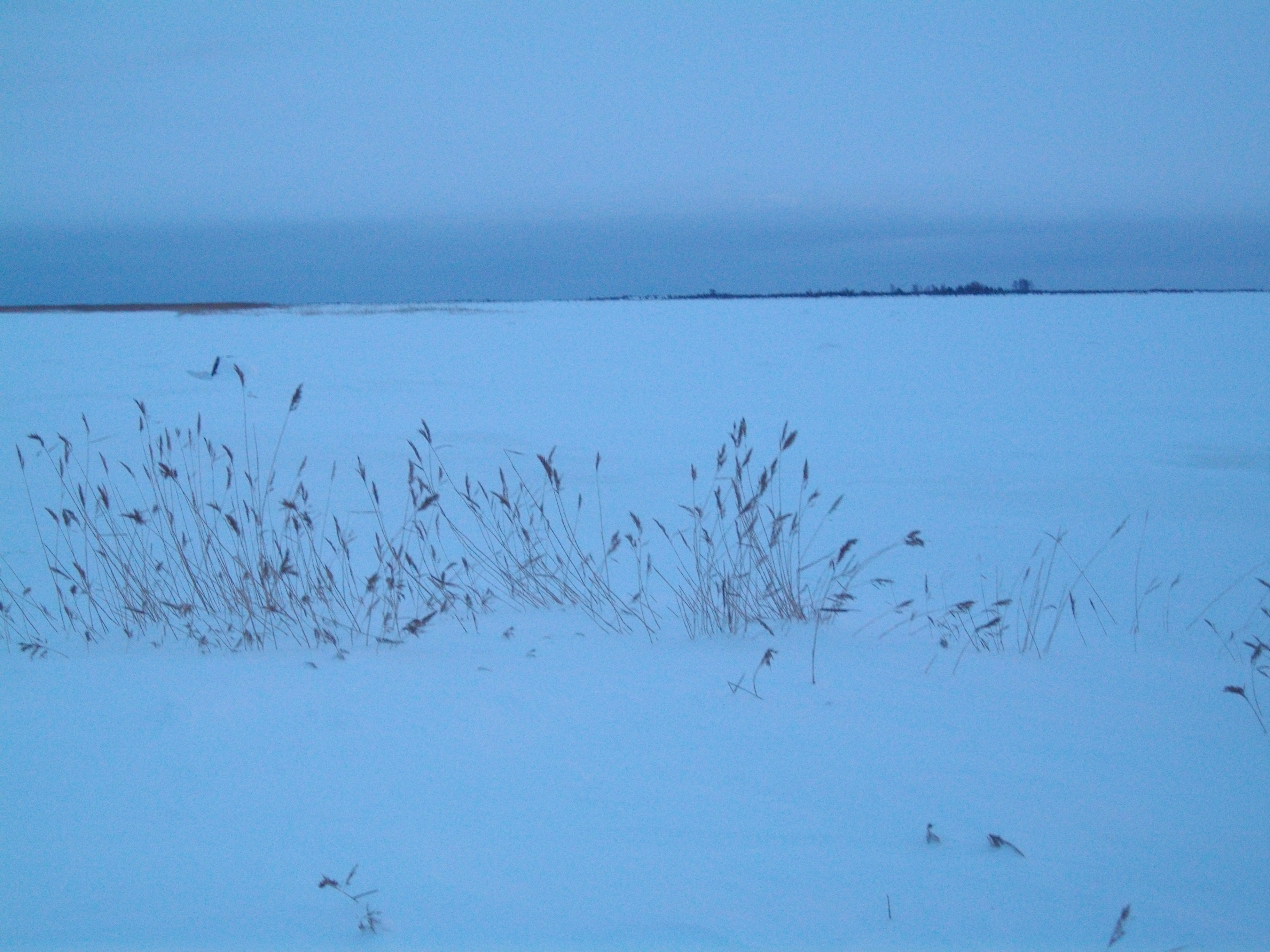 Vaade Võilaiule Rässa külast mere äärest. Vasakule jääb Võilaidu Muhu saarega ühendav maakitsus.